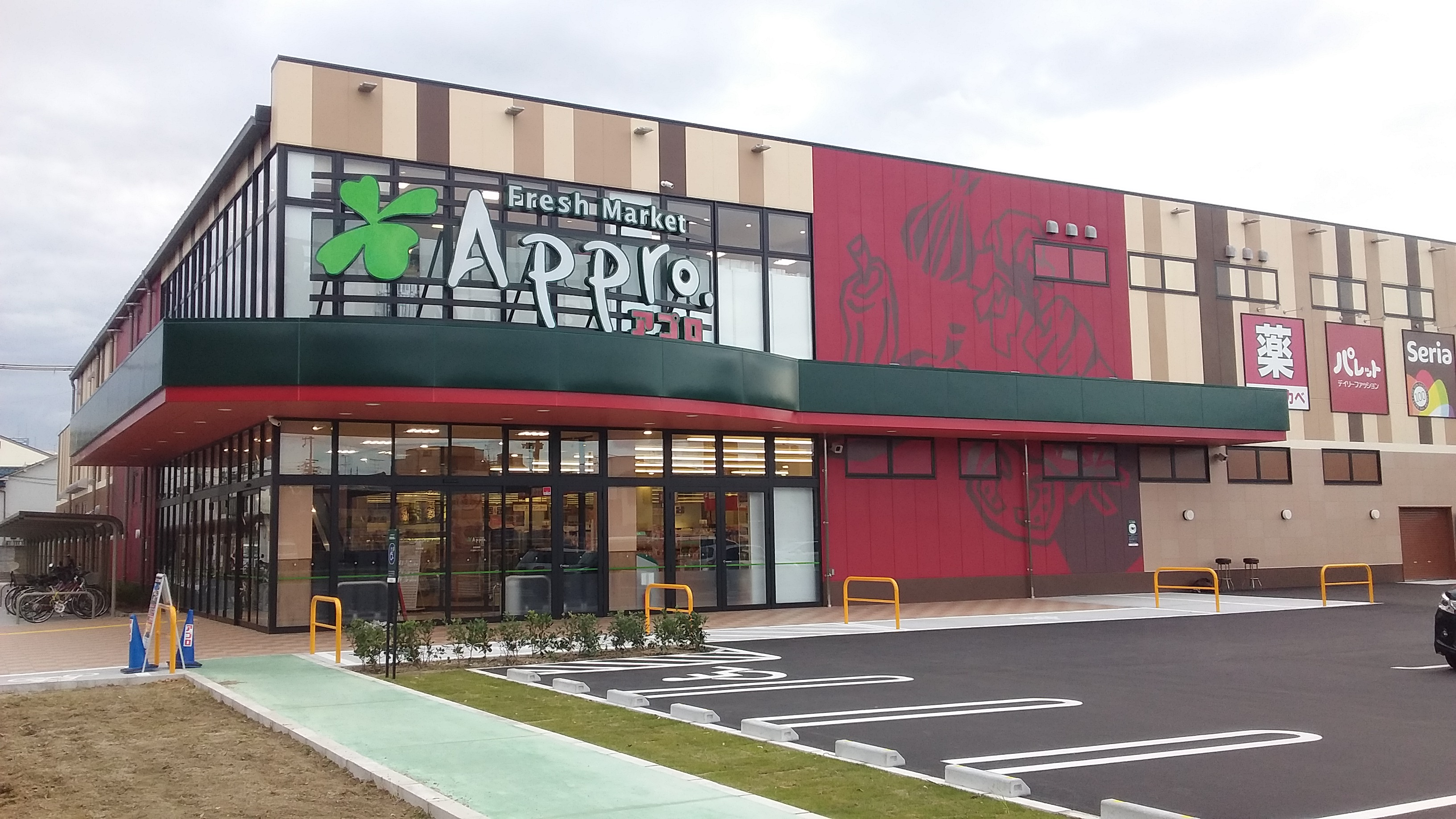 食品館アプロ 生野小路店 2017年11月オープン